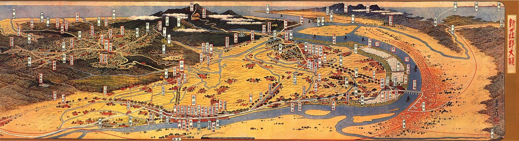 old-taipei